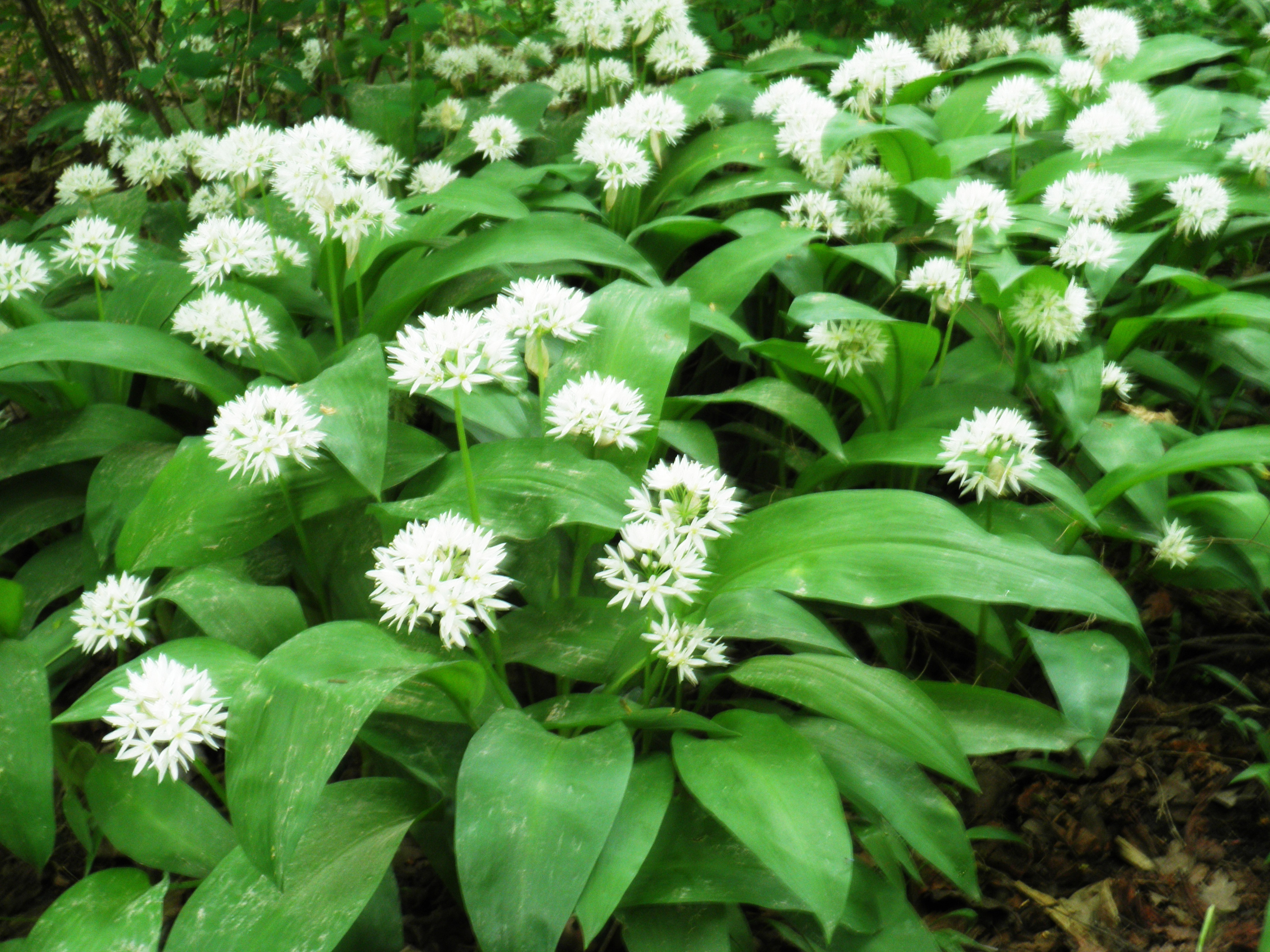 אמסטרדם